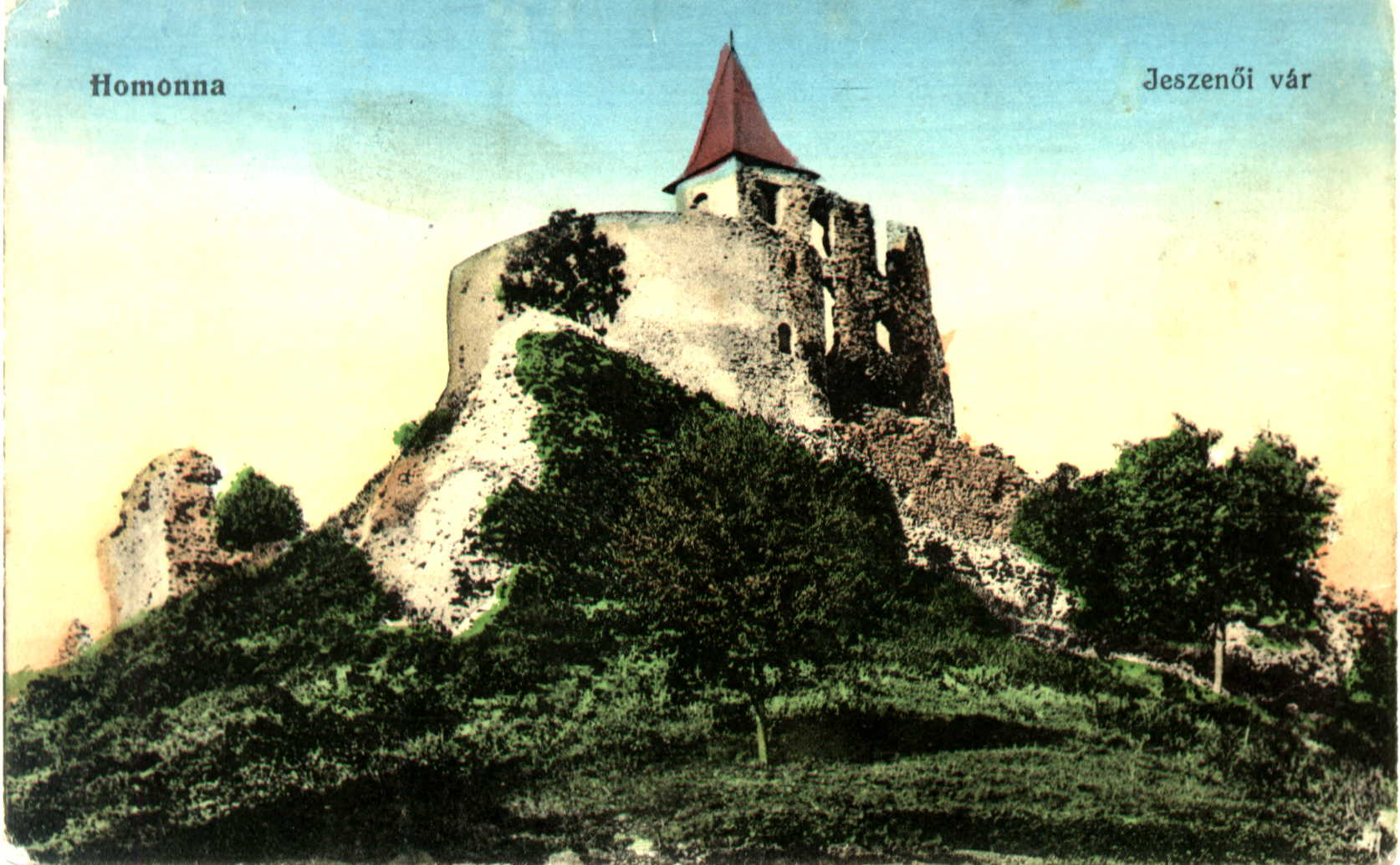 Historická pohľadnica hradu Jasenov